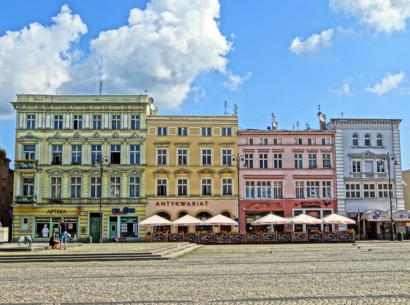 Północna pierzeja Starego Rynku w Bydgoszczy